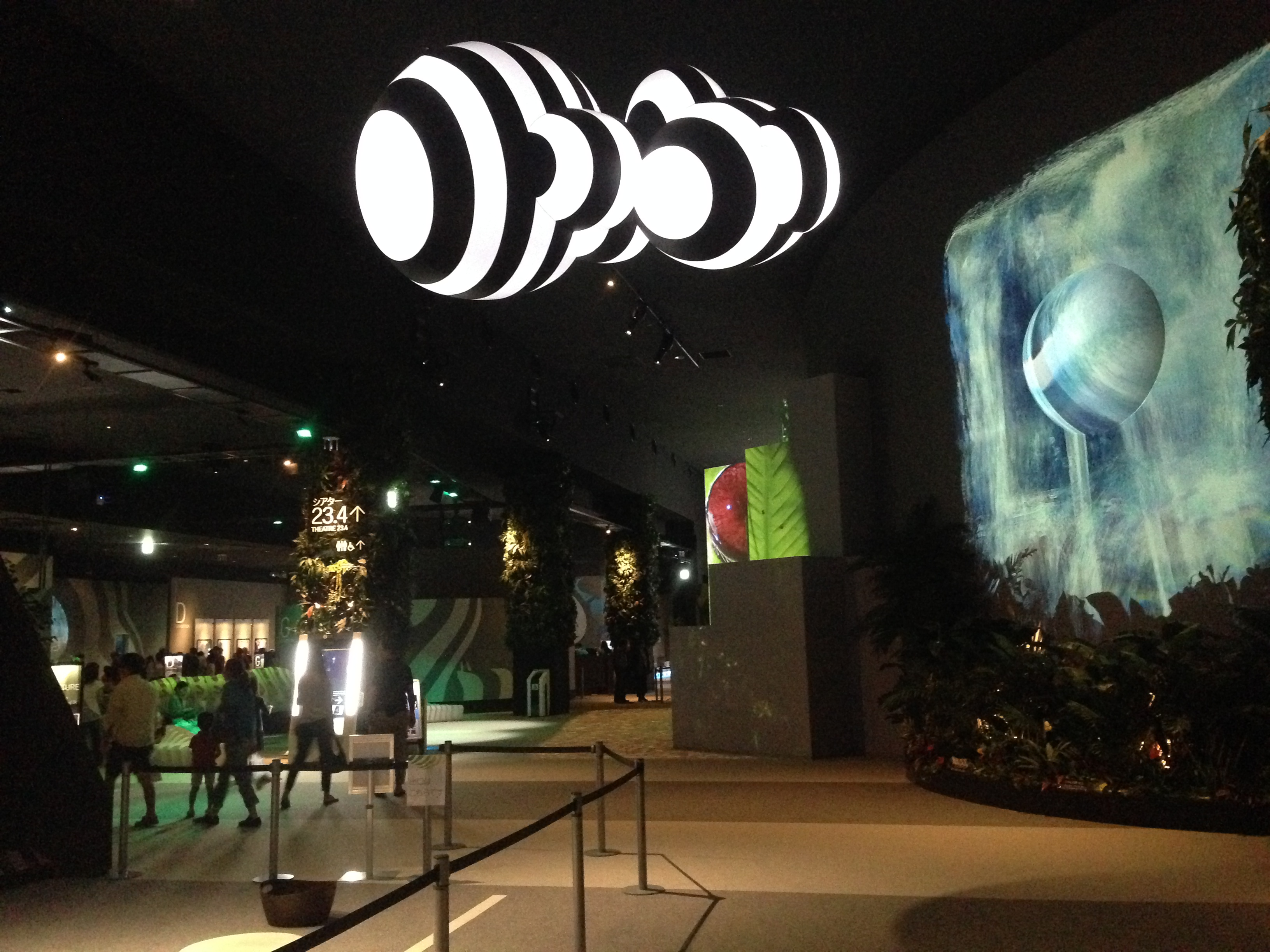 オービィ横浜（Orbi Yokohama）の館内の様子（撮影可能エリア）。